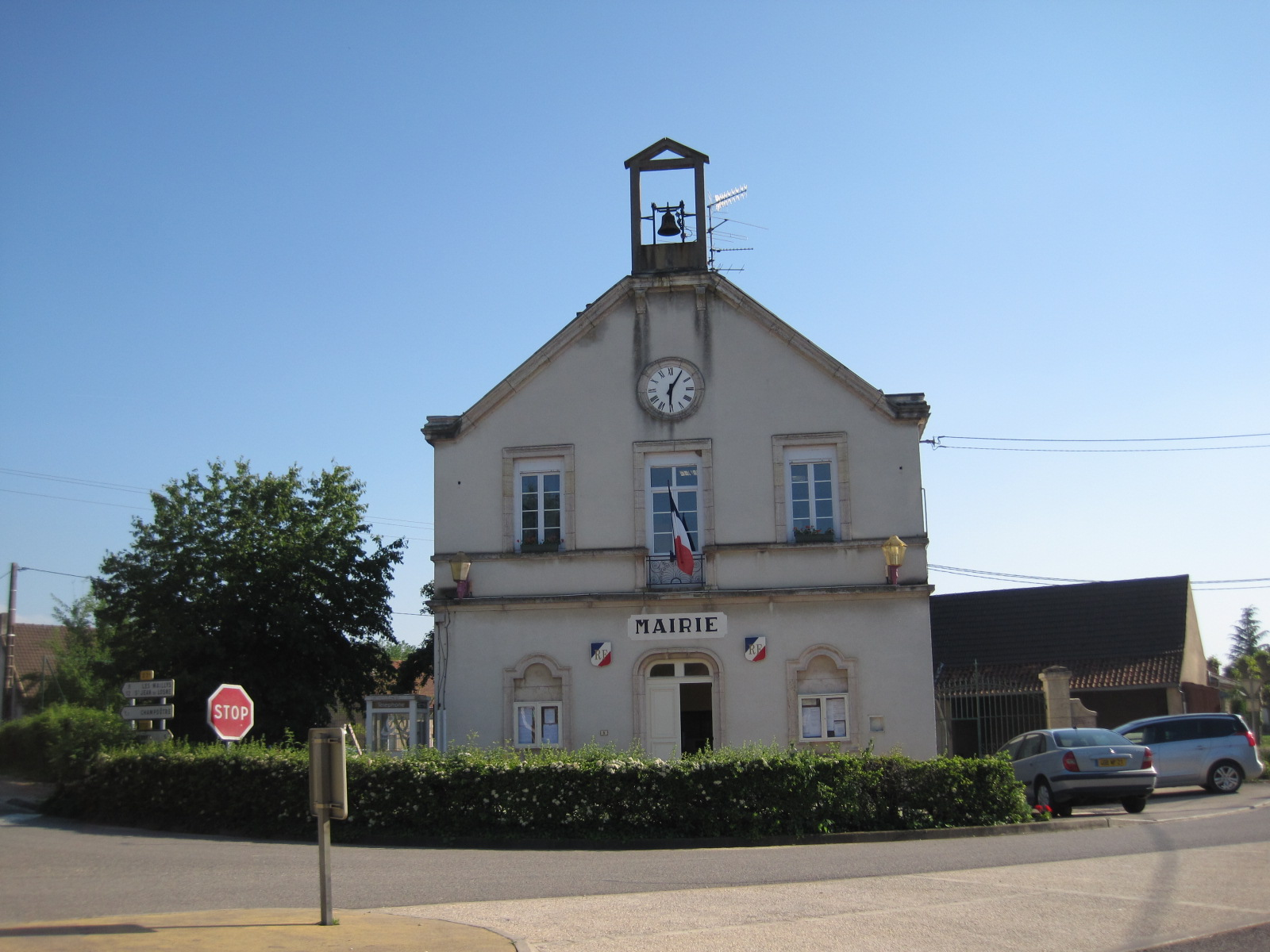 Mairie de Tréclun - Bourgogne